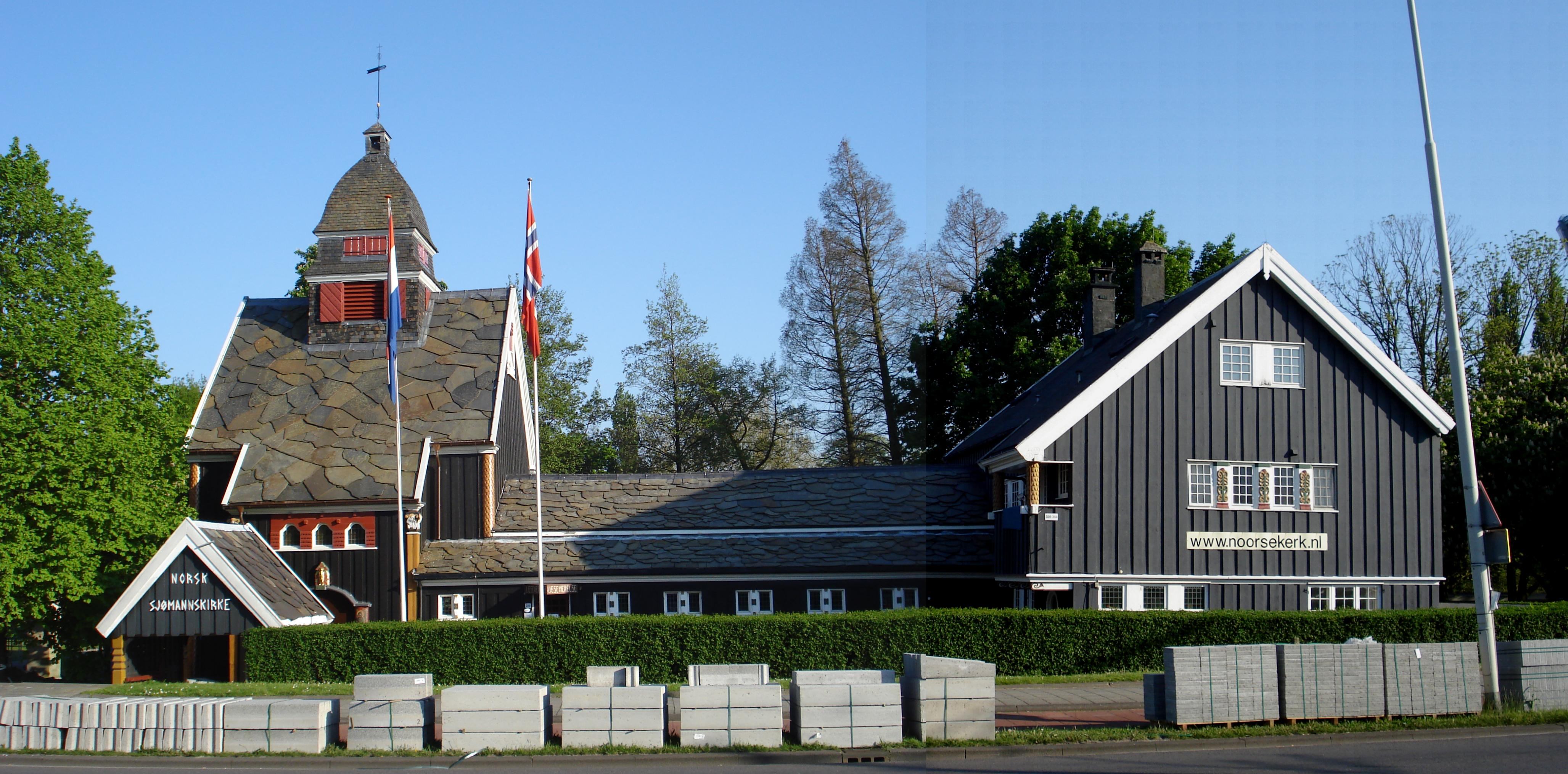 Rotterdam, Noorse Zeemanskerk. Rijksmonument.